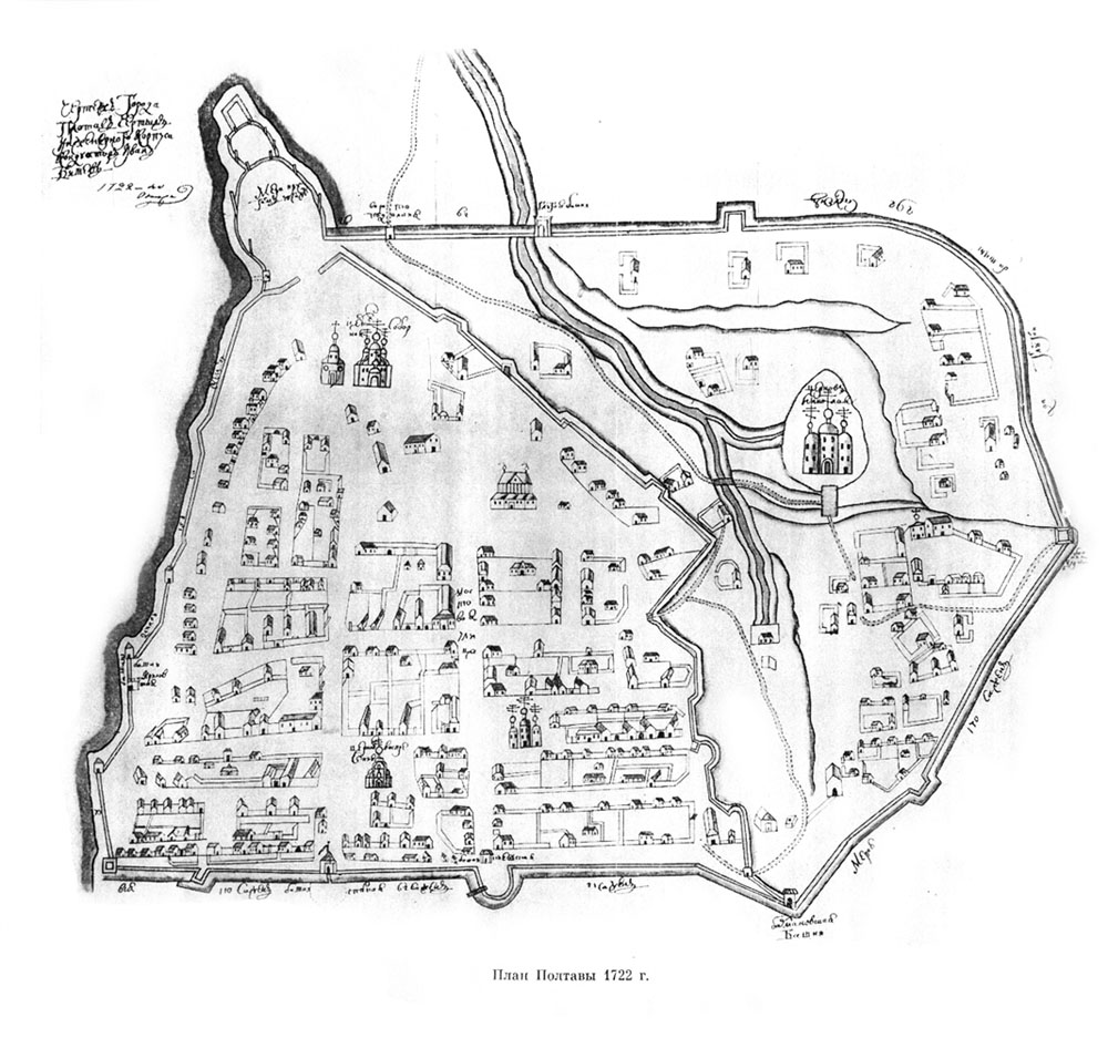 План Полтави Івана Бішева (1722 р.)